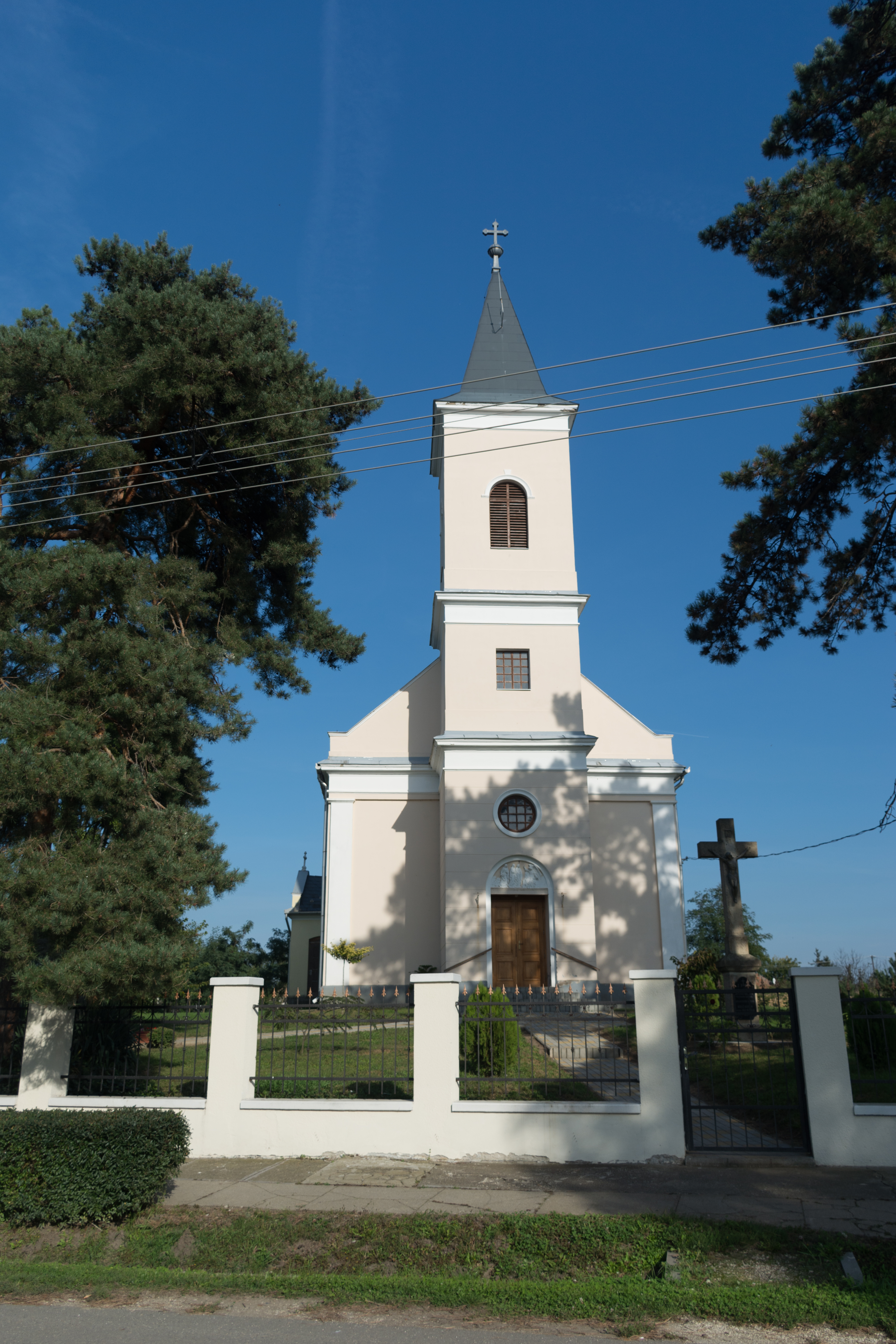 Tiszagyenda, 5233 Hungary